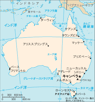 オーストラリア地図 - CIA Factbookより日本語化 掲載地名: グレートバリアリーフ、エーア湖、チモール海、カーペンタリア湾、アラフラ海、タスマン海、グレートオーストラリア湾、珊瑚海、インド洋、ダーウィン、ブリズベーン、アリススプリングス、マッケー、ケアンズ、キャンベラ、アデレード、シドニー、ニューカッスル、タスマニア島、タウンズビル、メルボルン、パース、フリマントル、ホバート、ローンセストン、コジウスコ山